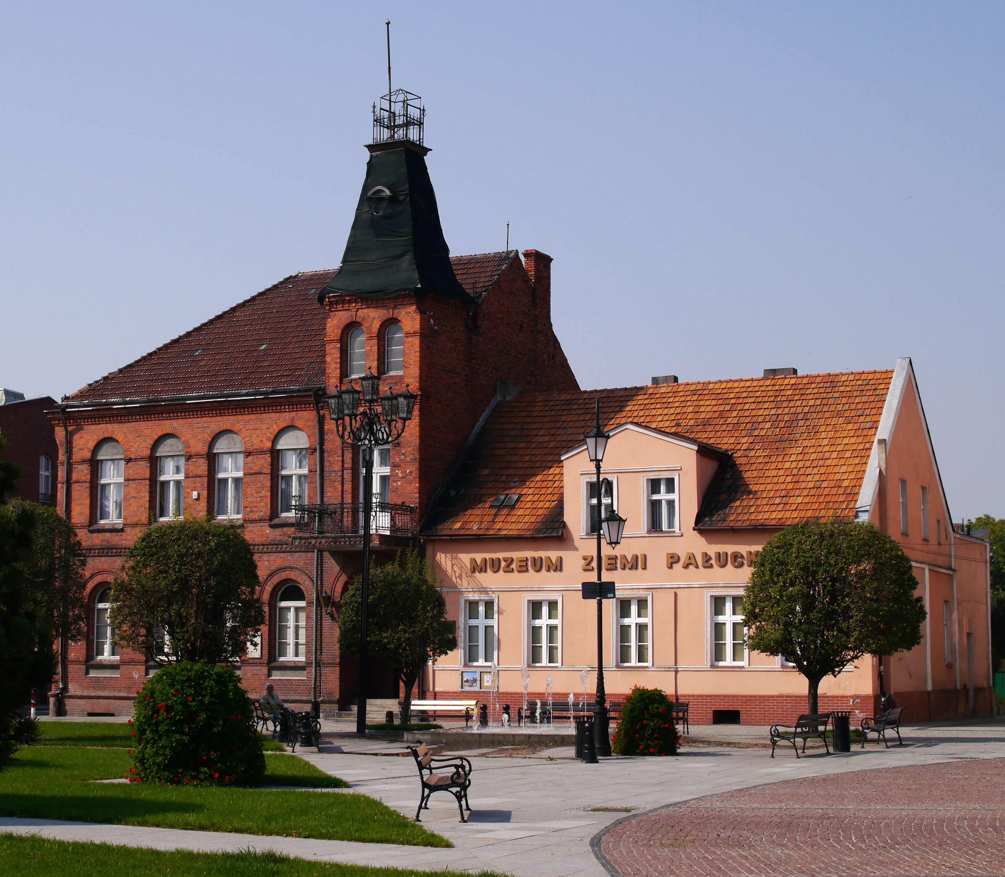 Żnin, pl. Wolności 1 / ul. Sienkiewicza - magistrat, ob. Muzeum Ziemi Pałuckiej, 1906